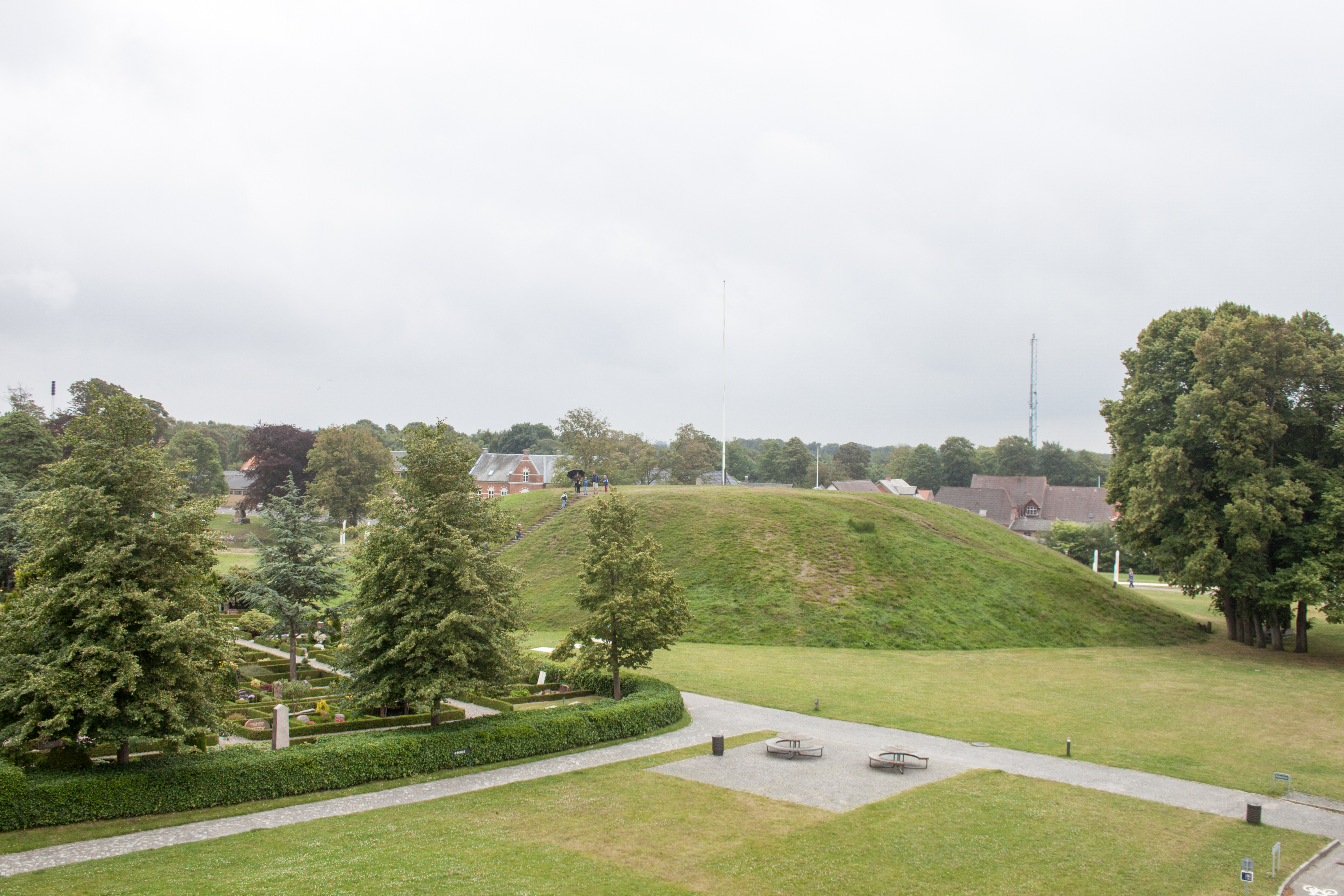 Kongernes Jellinglabel QS:Len,"Kongernes Jelling" label QS:Lhu,"Látkép a kiállítóközpont tetejéről"